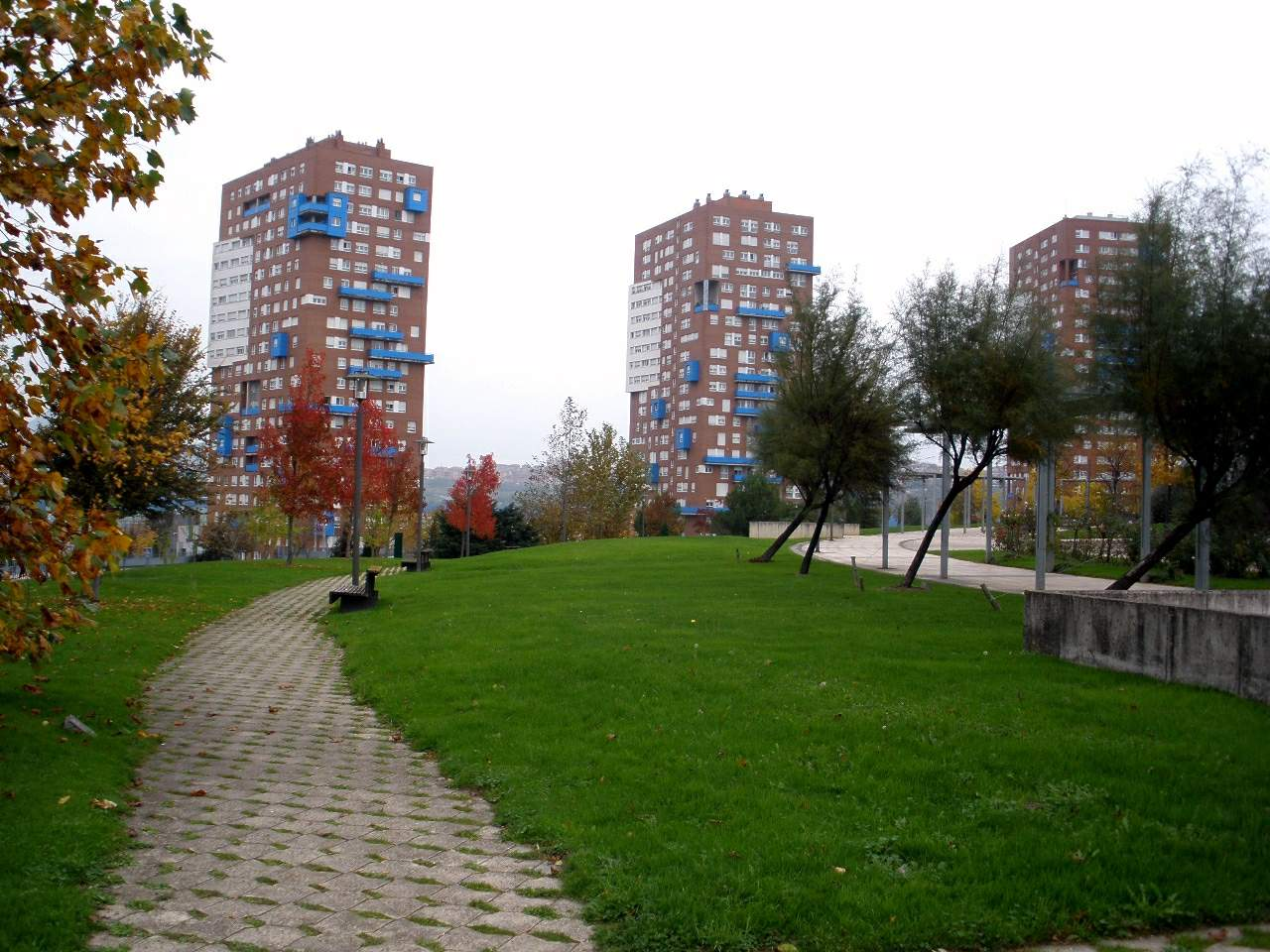 Jardín Botánico de Barakaldo (Bizkaia)